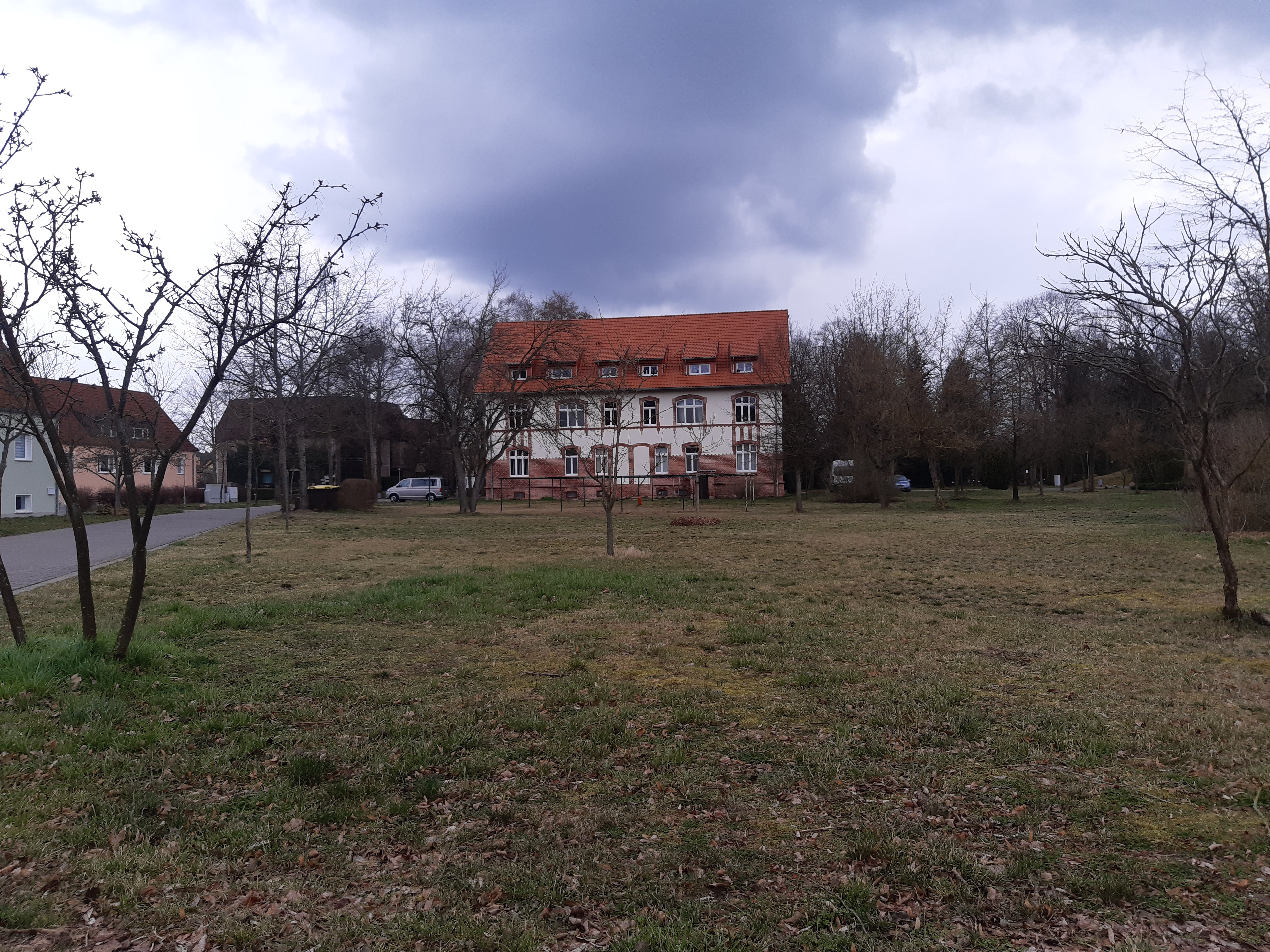 Haus